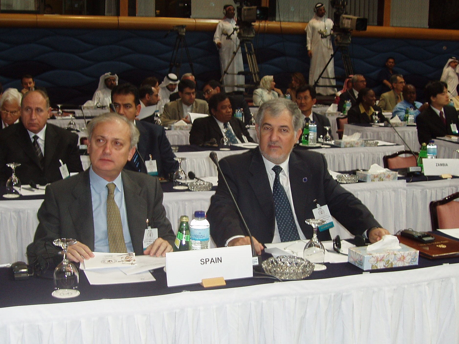 El Fiscal General español y el Fiscal Jose Luis Bueren, en la Cumbre Mundial de Fiscales Generales de Qatar en 2005.